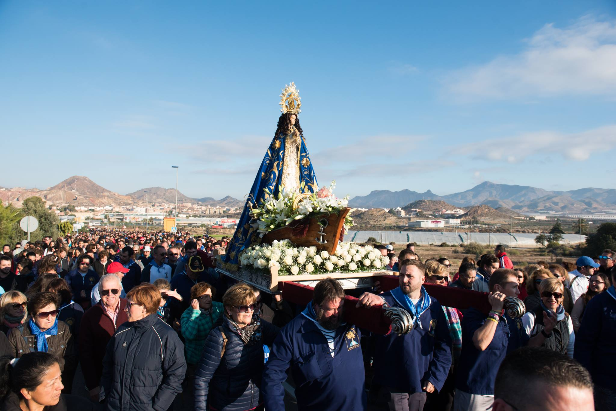 La Purísima de Bolnuevo o la Playera en su camino de regreso a la pedanía marinera